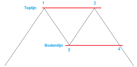 Visuele Analyse: Dubbele Top Koerspatroon